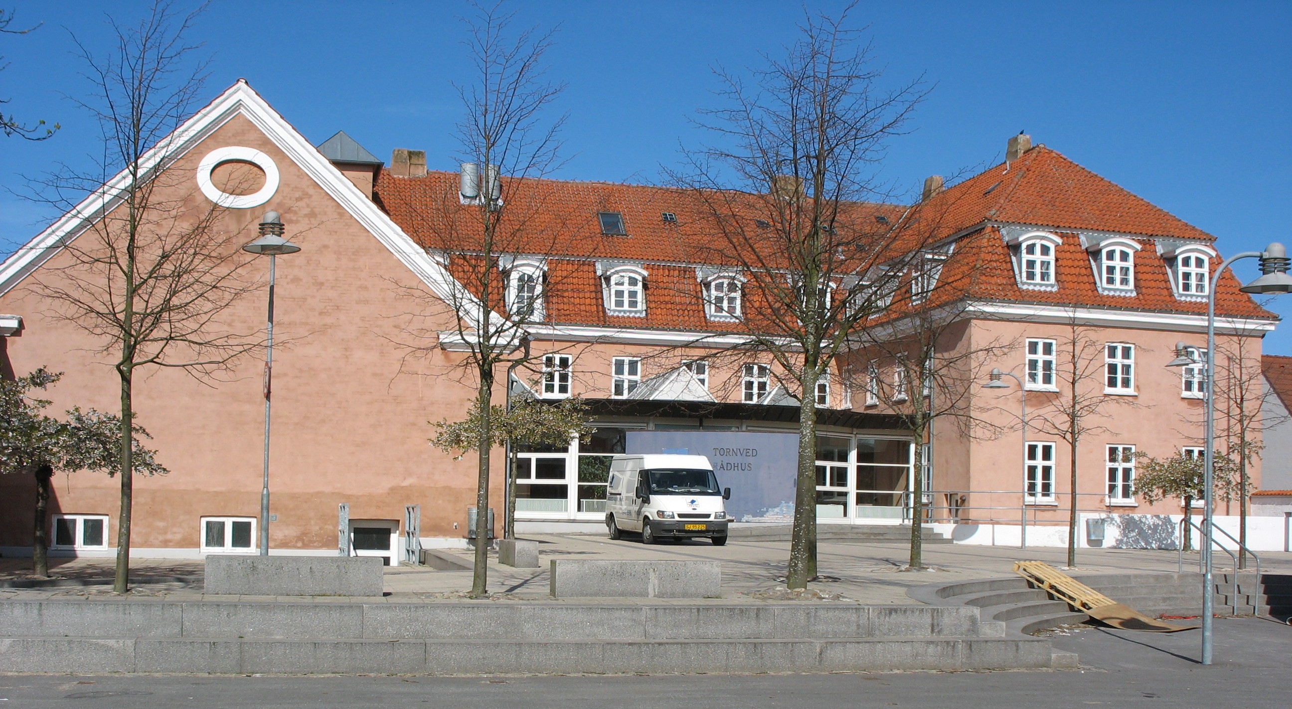 Det tidligere Tornved Rådhus på Skarridsøgade 37 i Jyderup, nu Jyderup Bibliotek